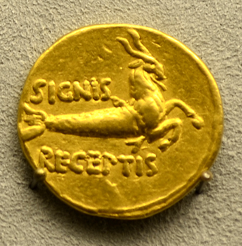 Berlin Pergamonmuseum, Aureus, FO: Pergamon, kaiserzeitlich, SIGNIS REGENTIS, Capricornus als persönliches Zeichen des Augustus, 19-18 v.u.Z.